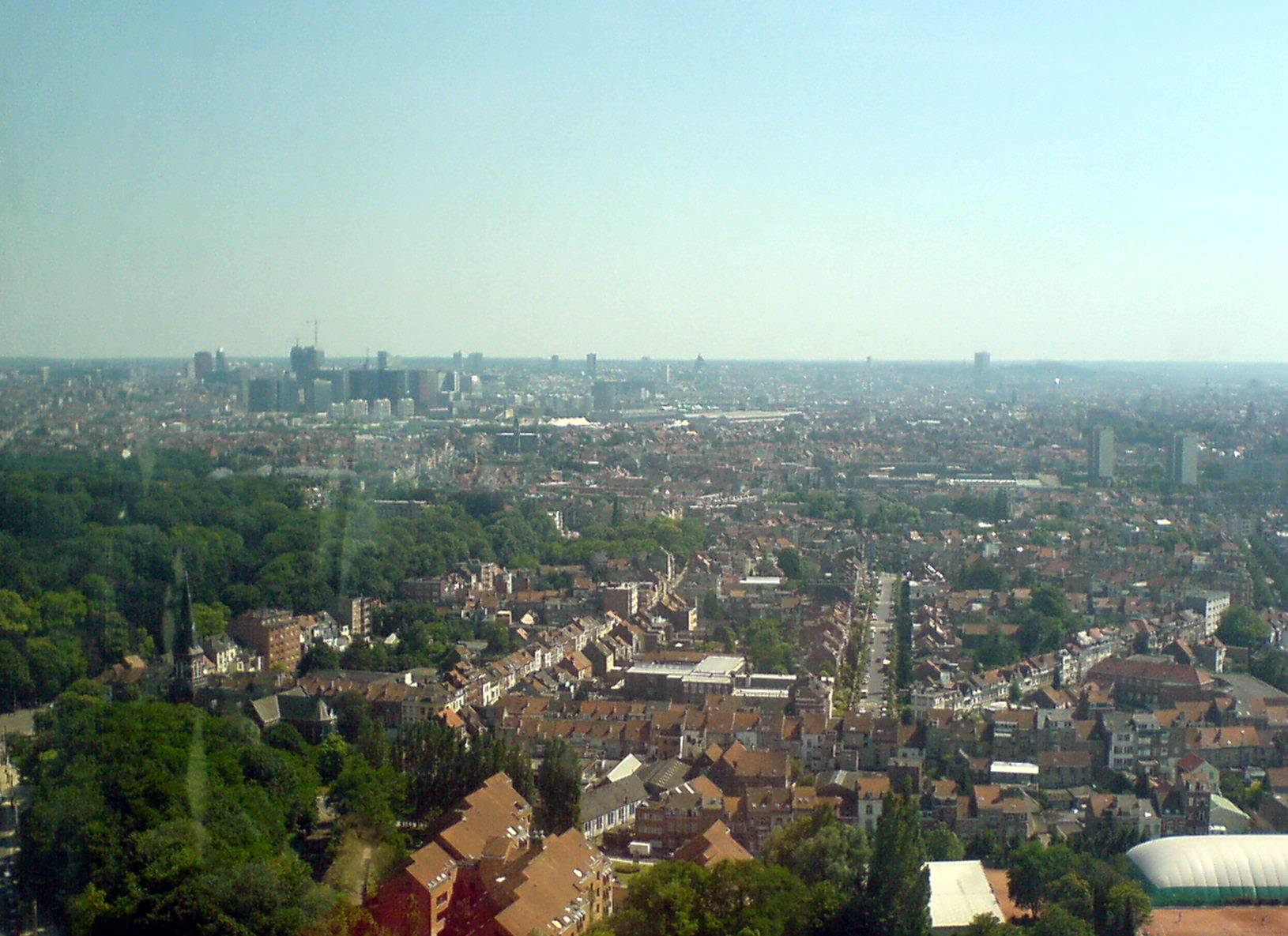 Overview of Brussels.